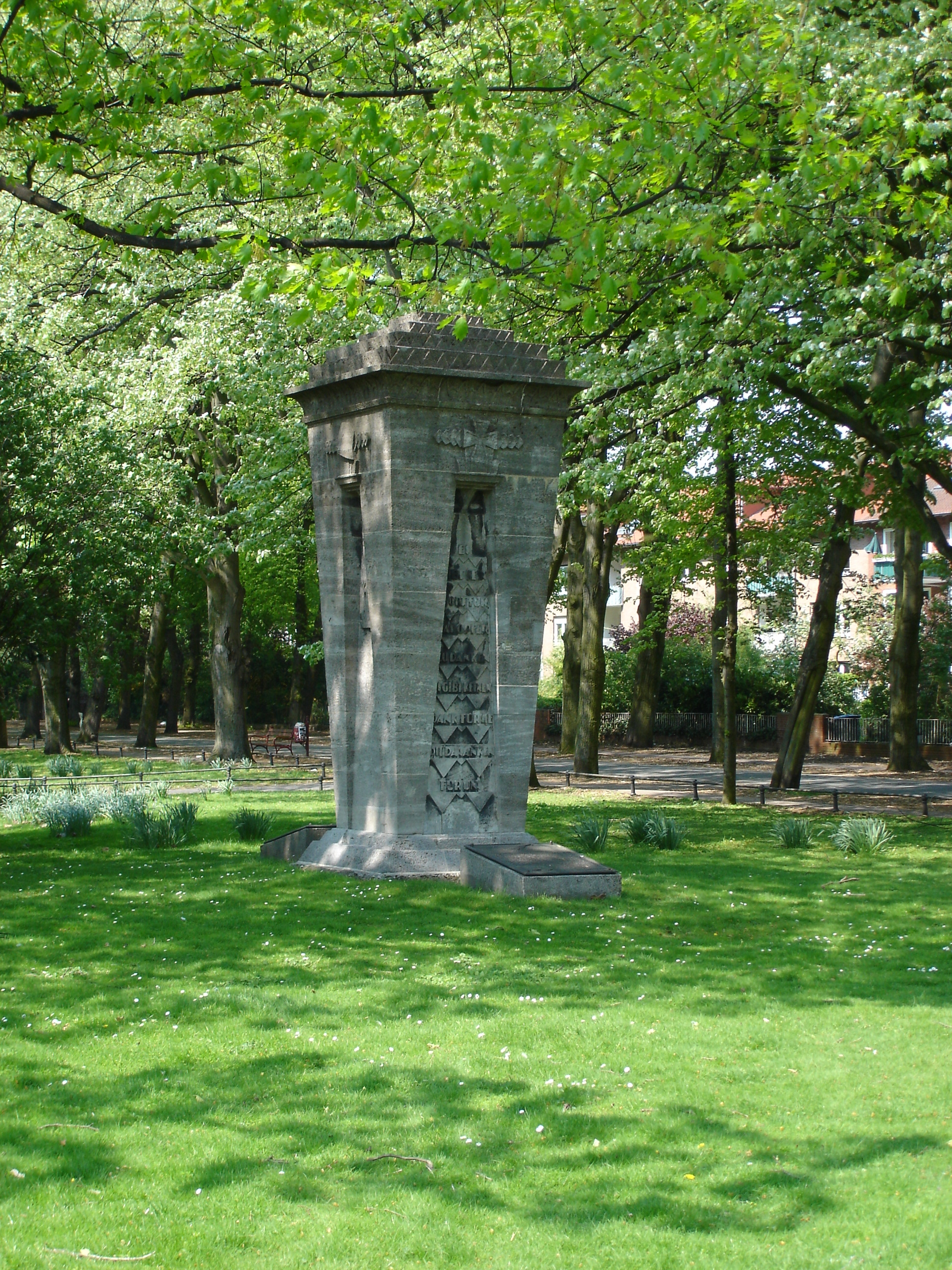 Ehrenmal für die Gefallenen des Train Bataillon Nr. 7 in China 1901 und Deutsch-Südwest-Afrika 1905 - 1906 in Münster, Westfalen, Deutschland